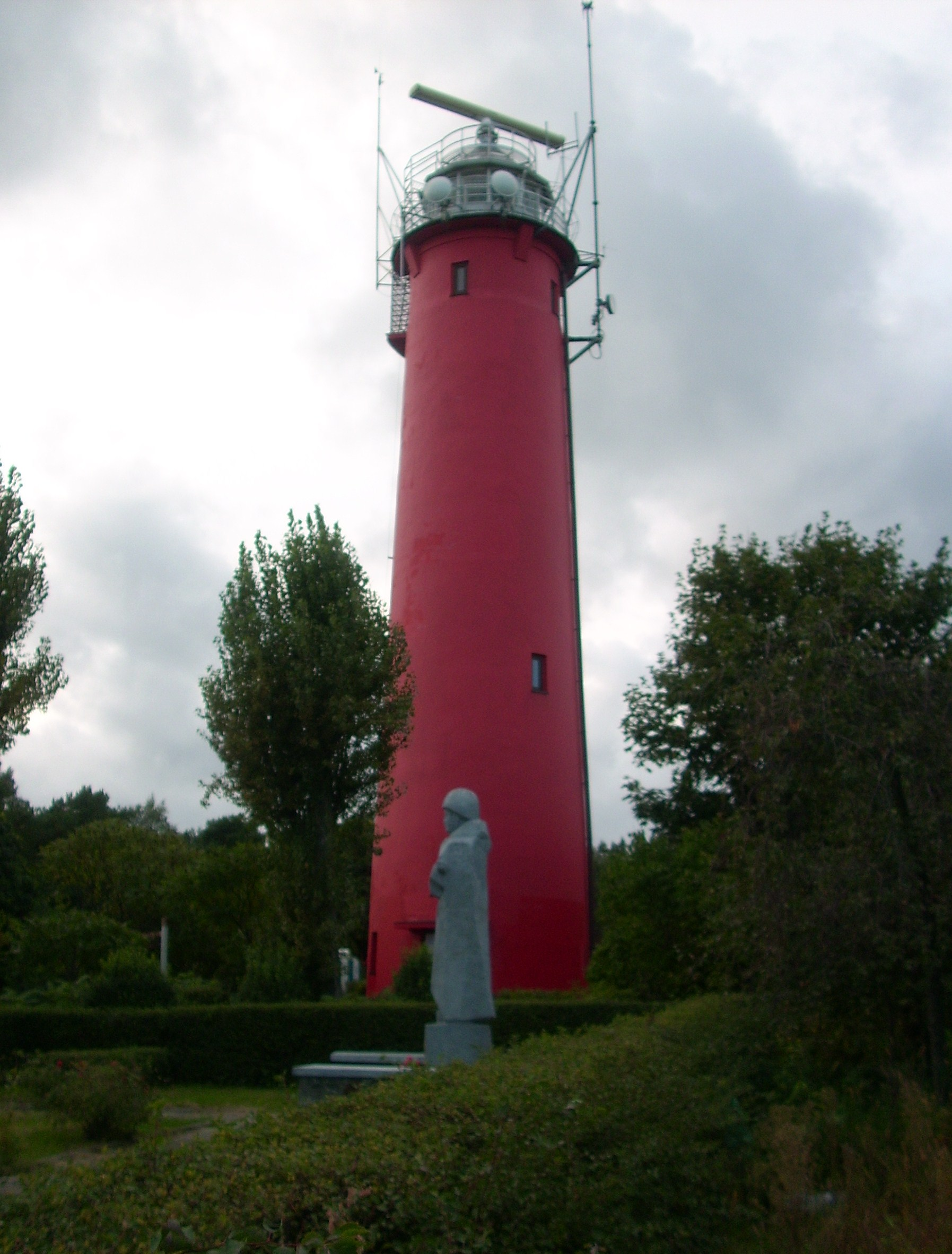 układ ruralistyczny, XIX-XX, widok na Latarnię morska w Krynicy Morskiej